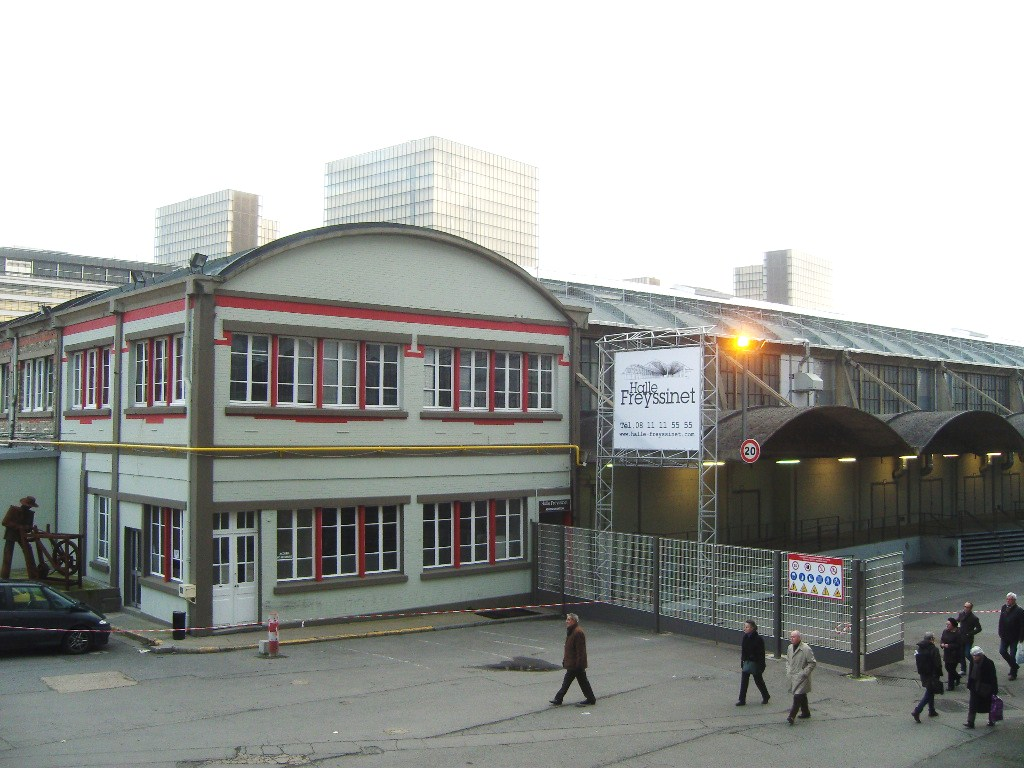 Paris 13e arrondissement - Halle Freyssinet, ancienne halle ferroviaire - vue avant